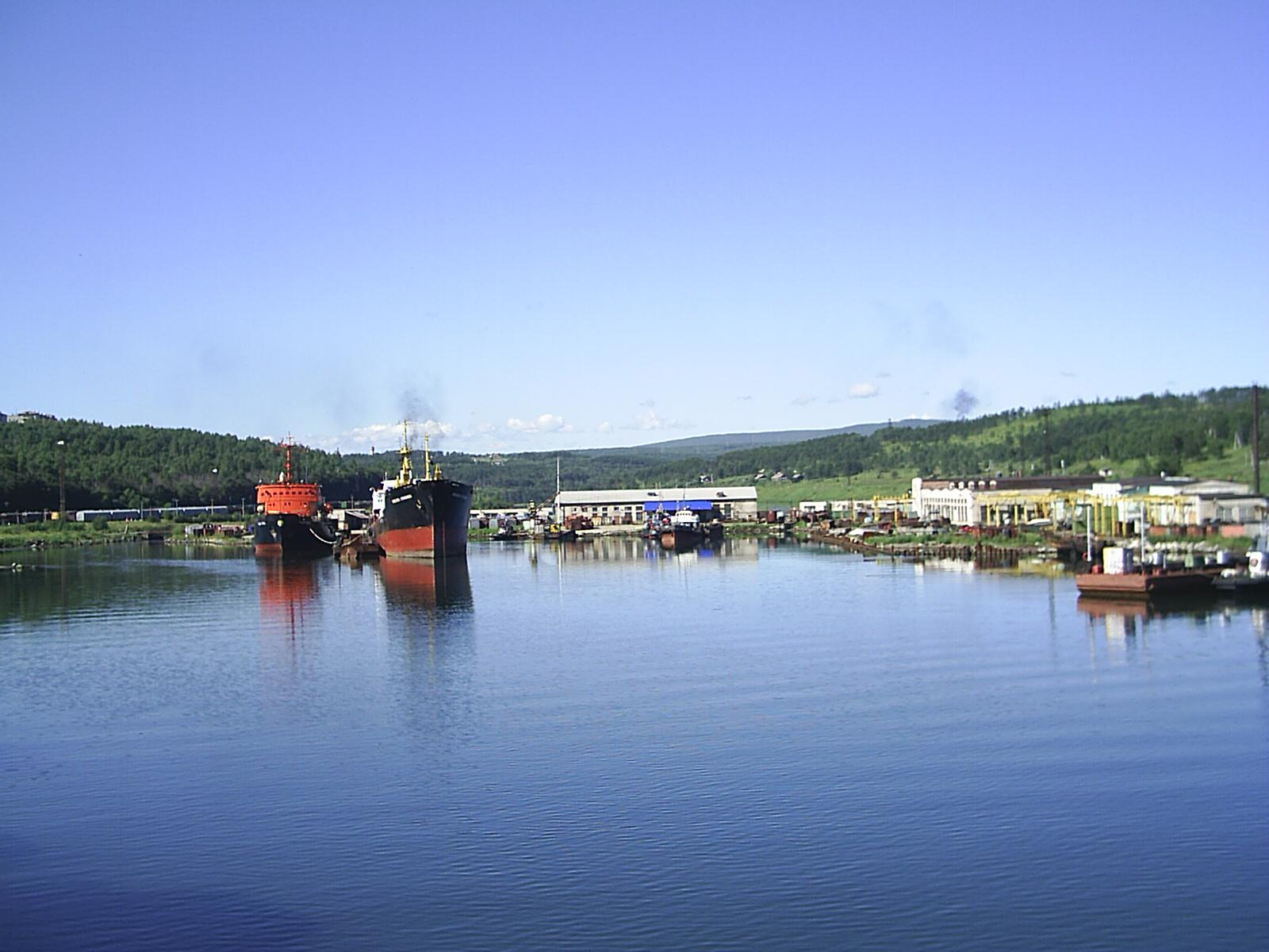 Ванинская бухта. Снимок сделан летом 2006 г.